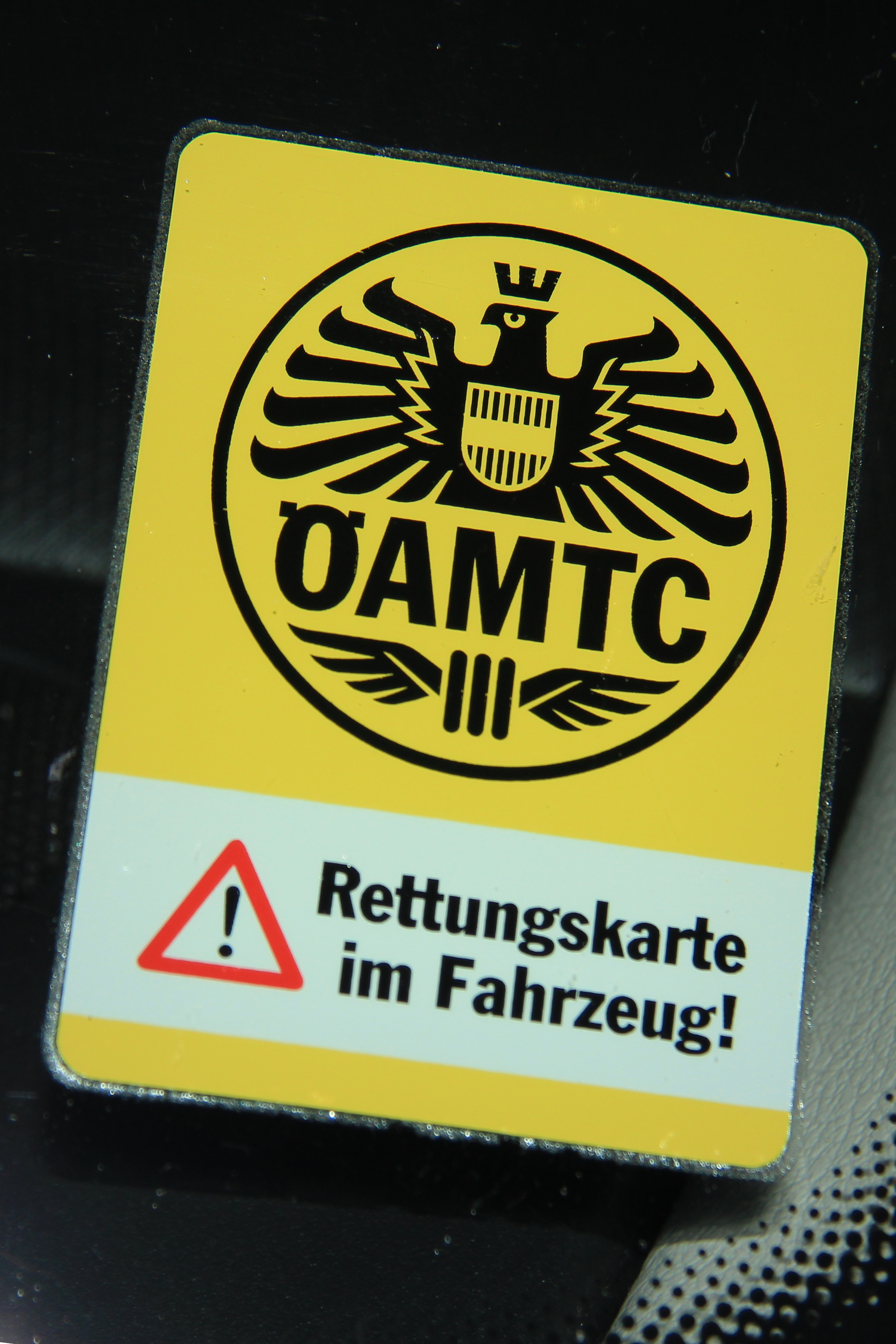 Aufkleber für eine Rettungskarte im Fahrzeug